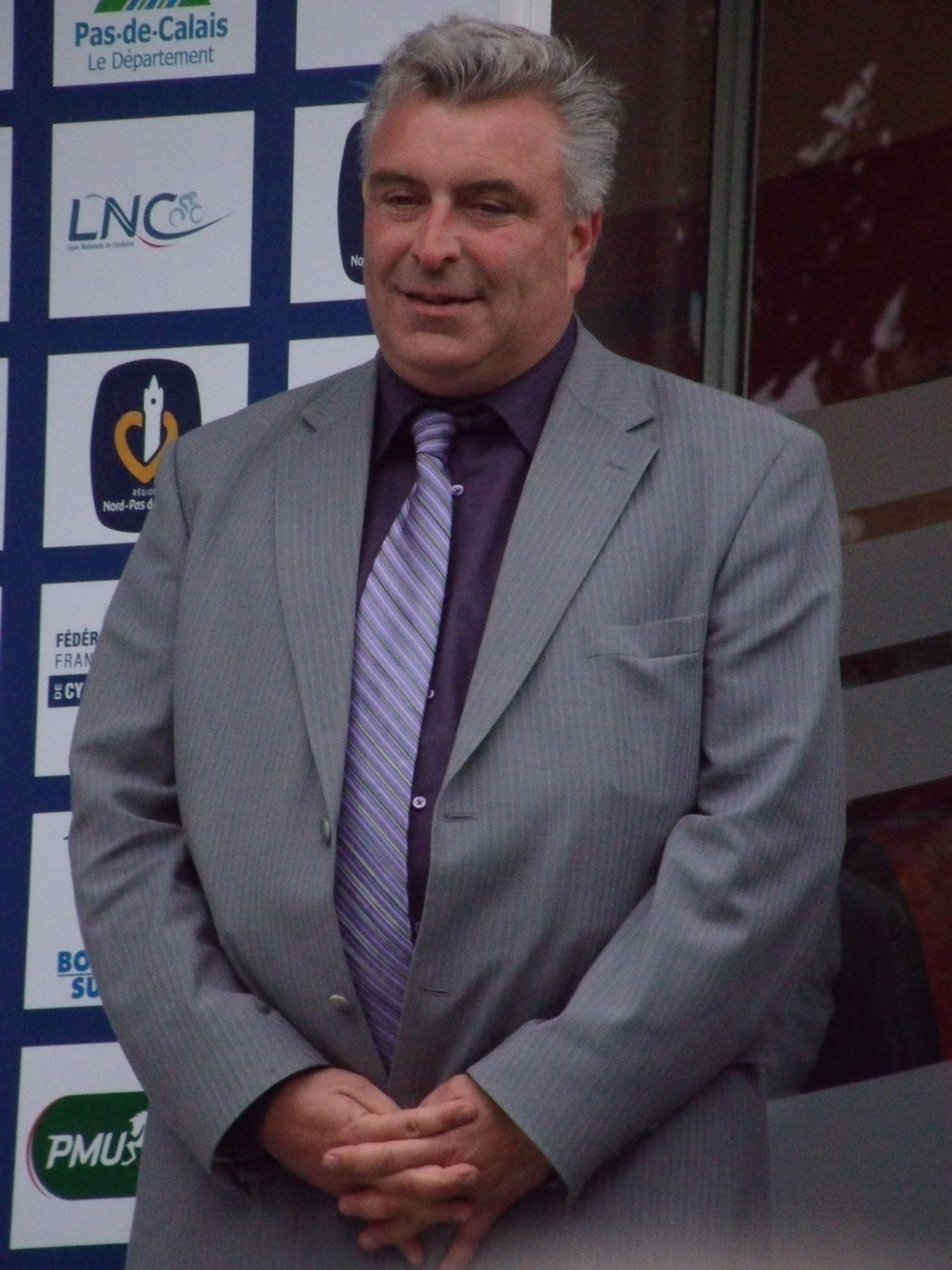 Frédéric Cuvillier sur le podium du championnat de France de cyclisme sur route 2011